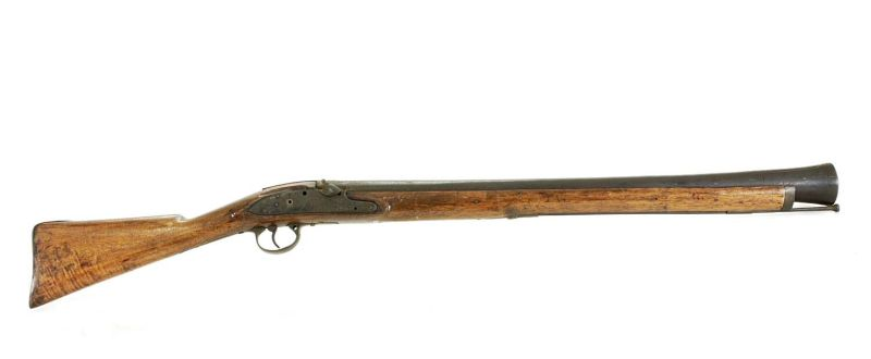 Geweer. Donderbus met vuursteenslot, typisch Engels Towermodel. Het slot vertoont inscripties. De haan is afgebroken.. Donderbus met vuursteenslot